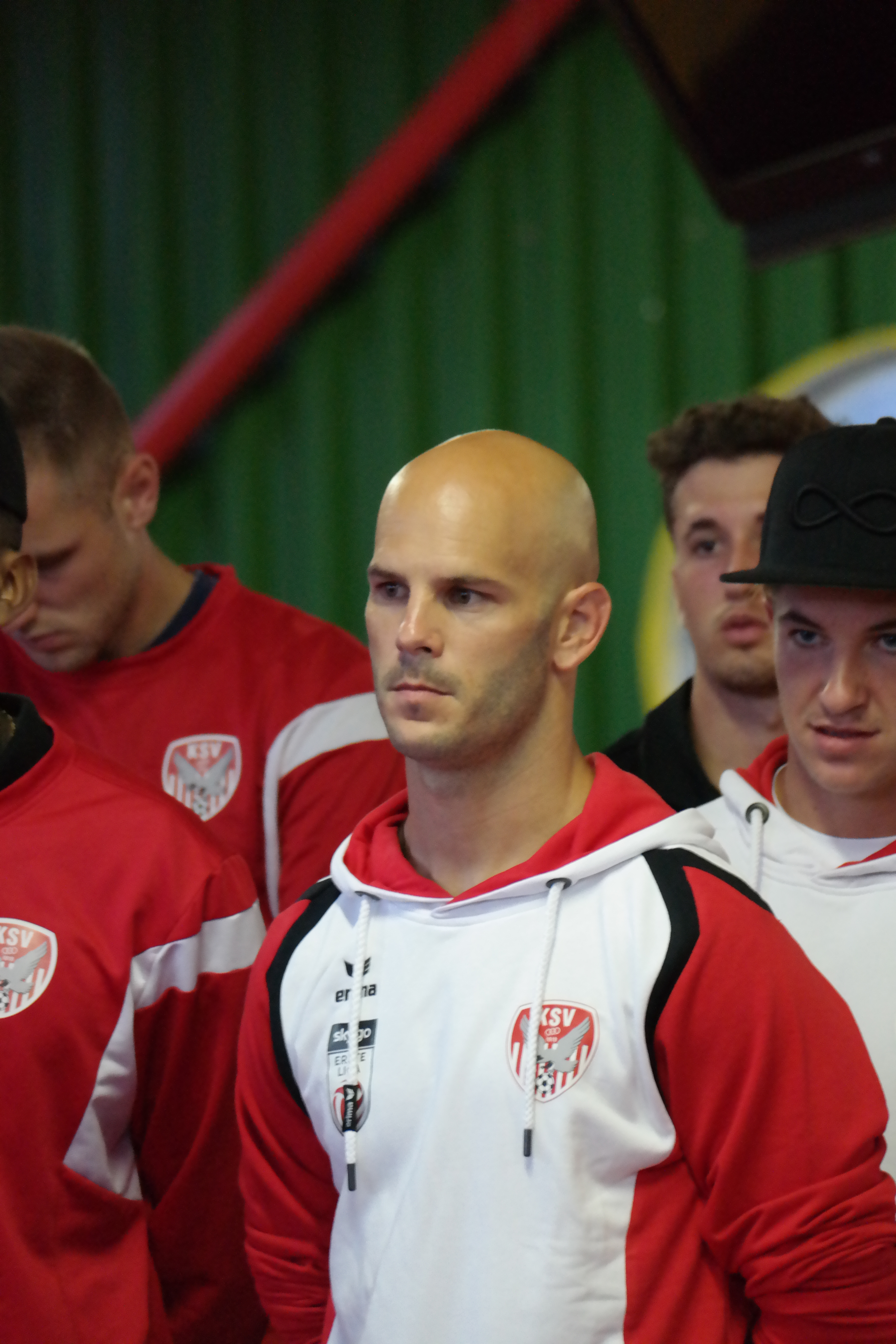 Mannschaftspräsentation der KSV im Juli 2017